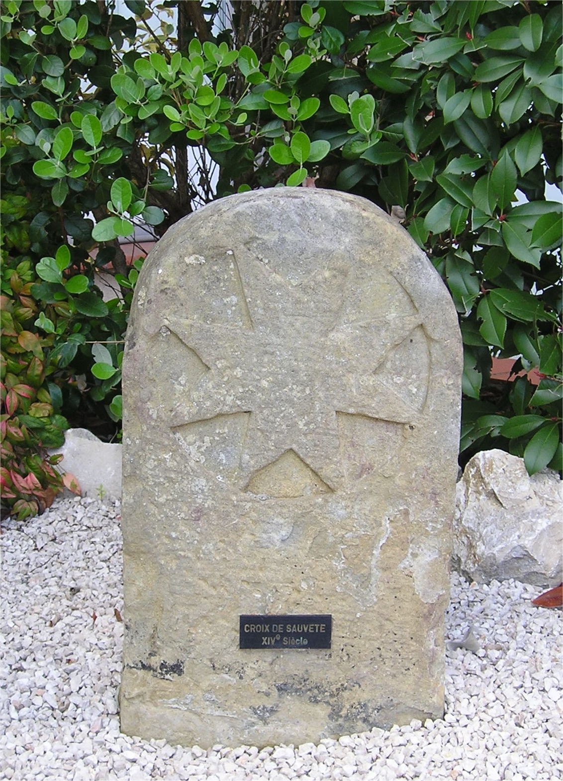 Croix de sauveté de Léguevin du XIVe siècle. Cette croix est située place de la Mairie.